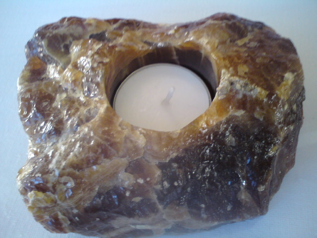 Onyks. Ubehandlet